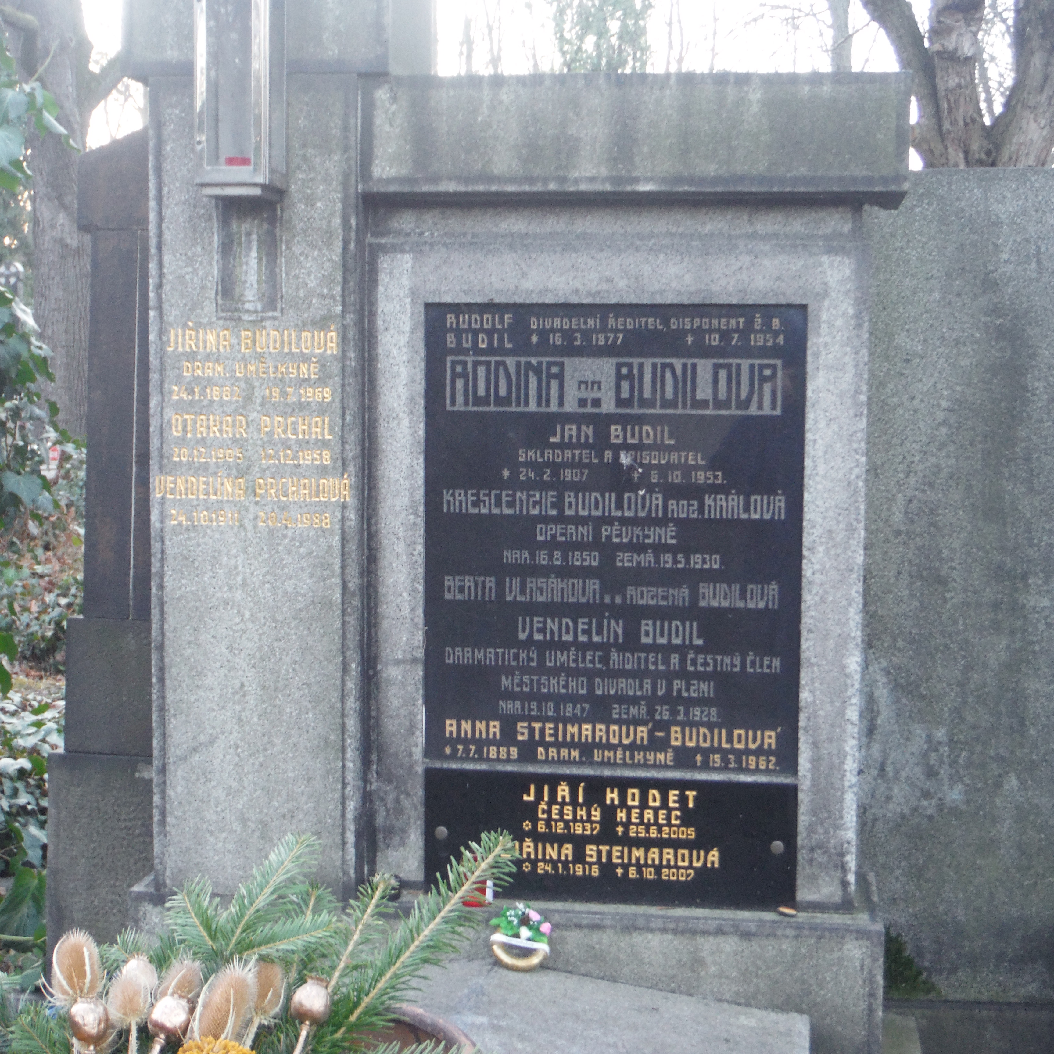 hrob